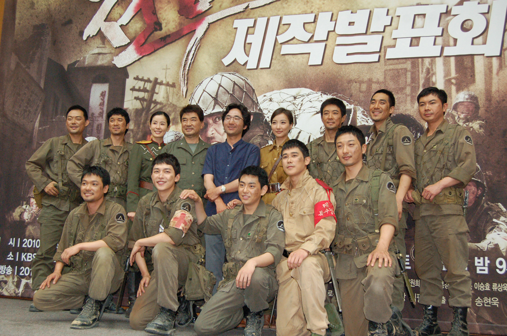 드라마 전우